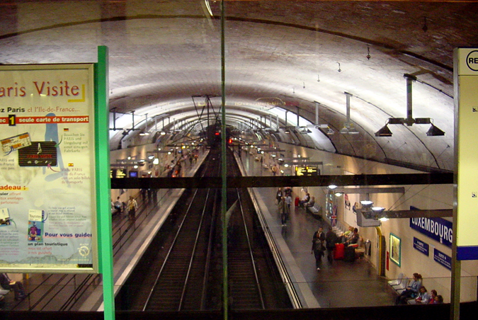 Gare RER du Luxembourg, Paris Ve arrondissement.